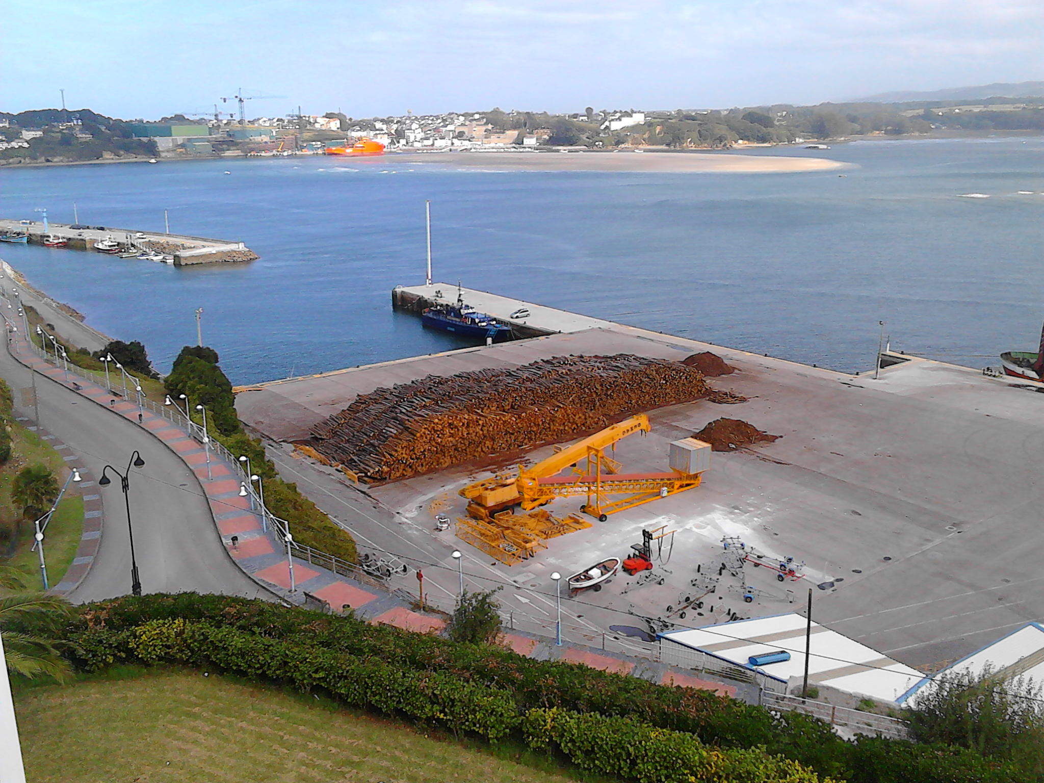 Madeira acumulada no porto de Mirasol (Ribadeo), visto dende o Parador de Turismo de Ribadeo.